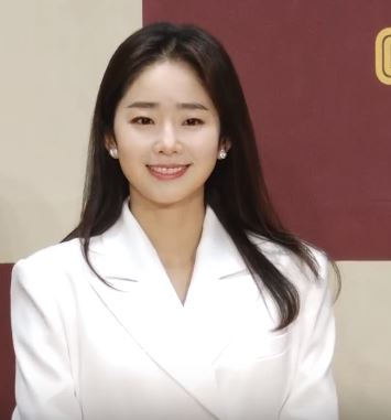 디스패치 구독 클릭! Dispatch Subscribe